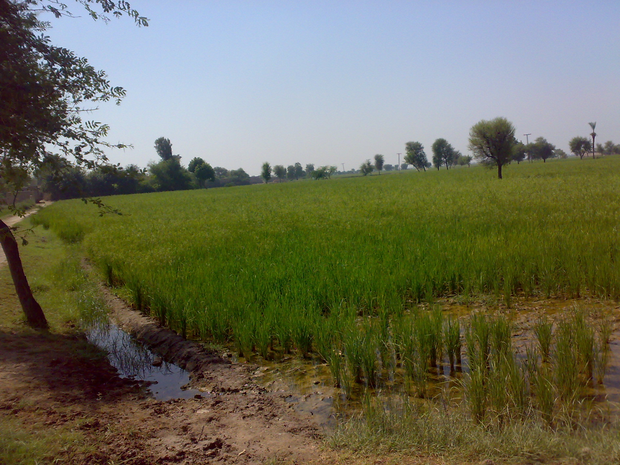 Dadu Tehsil, Pakistan